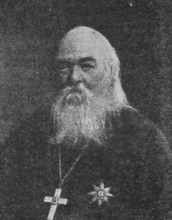 Это изображение было использовано для иллюстрирования статьи «Желобовский, Александр Алексеевич» опубликованной в десятом томе «Военной энциклопедии», который был издан книгоиздательским товариществом И. Д. Сытина в 1912—1913 гг. в столице Российской империи городе Санкт-Петербурге.